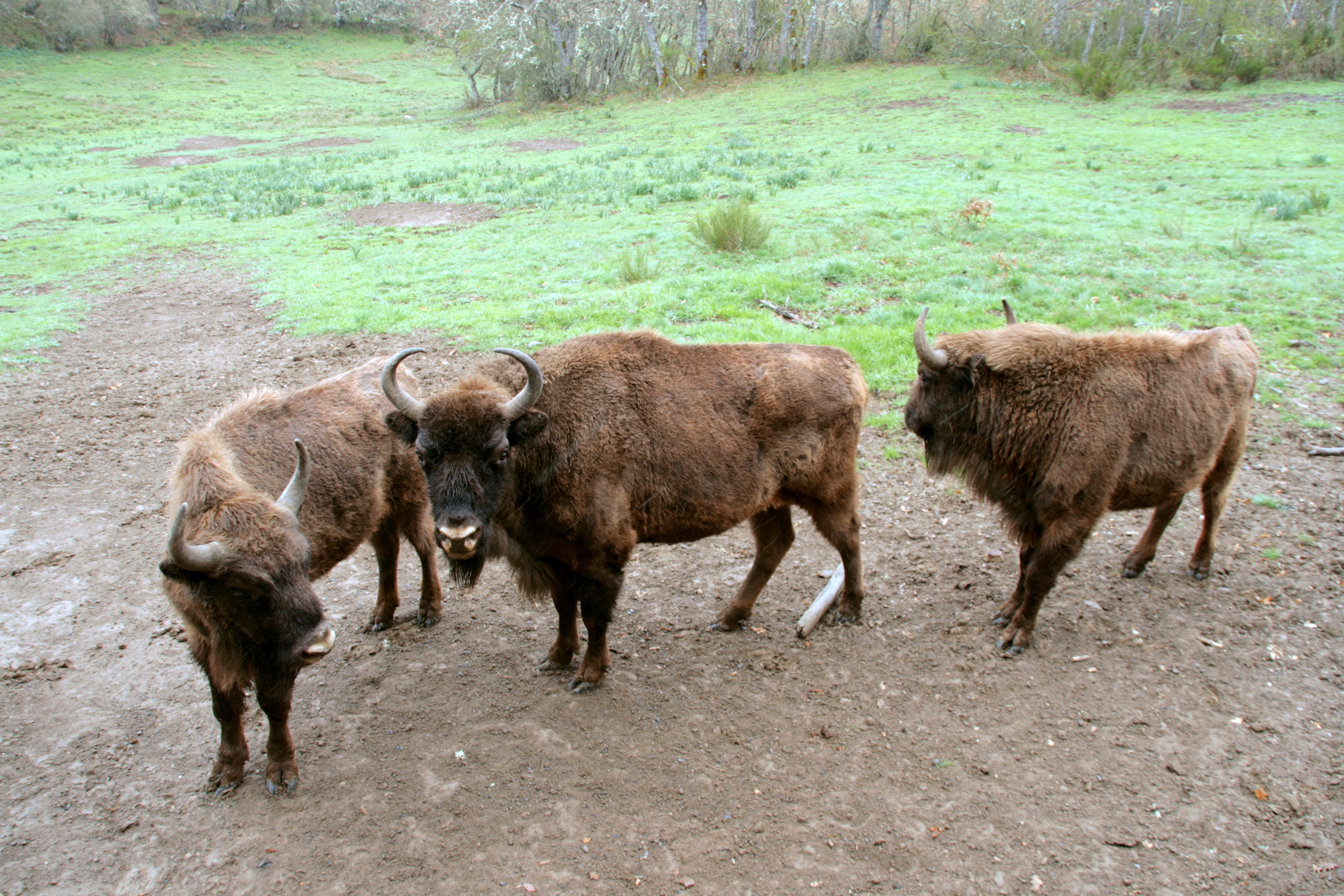 Bisontes europeos en en Bison Bosanus, Reserva y Centro de Interpretación del Bisonte Europeo de San Cebrián de Mudá (Palencia) This is a photography of a Special Area of Conservation in Spain with the ID: ES4140011. Natura2000 entry, EEA entry